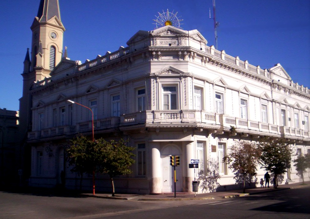 Palacio Municipal, Junín, Argentina. A la izquierda, la Iglesia Matriz San Ignacio de Loyola.